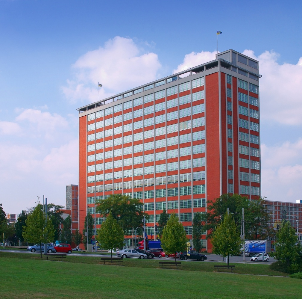 Baťův mrakodrap, Zlín 21